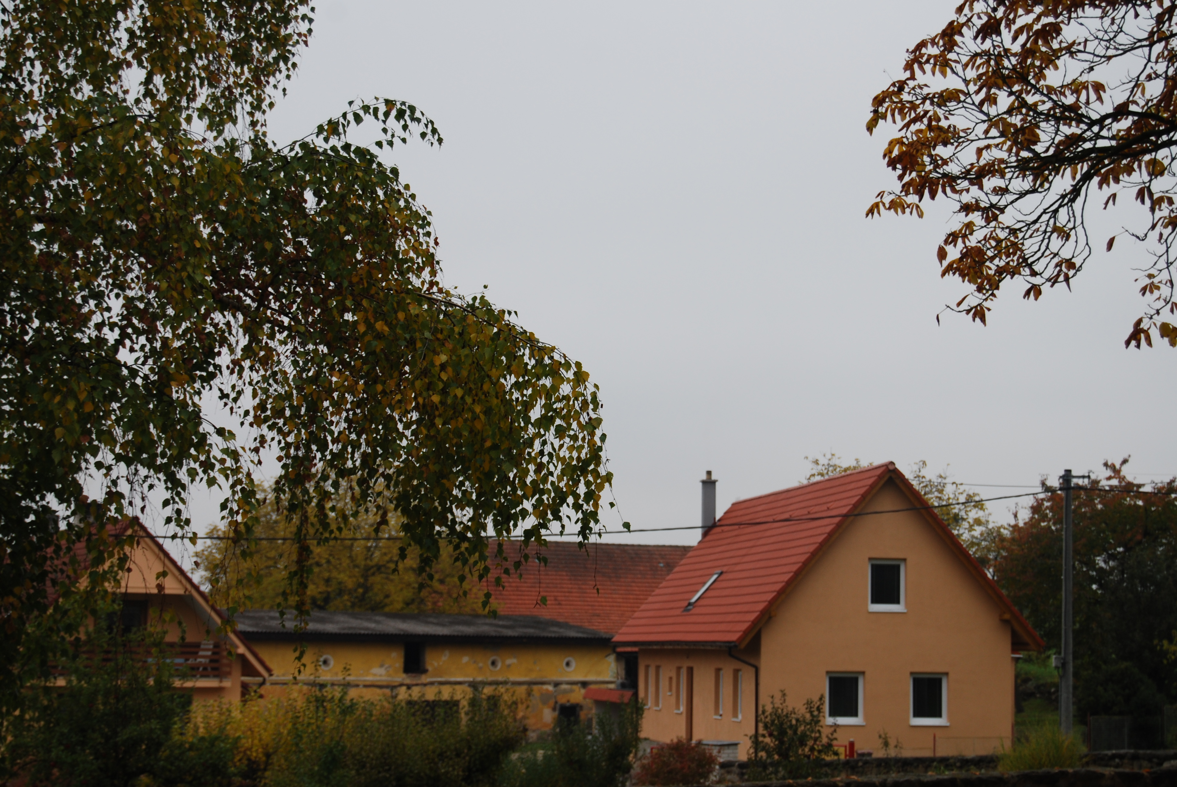 Dům v obci. Zhoř je část obce Krásná Hora nad Vltavou v okrese Příbram. Česká republika.